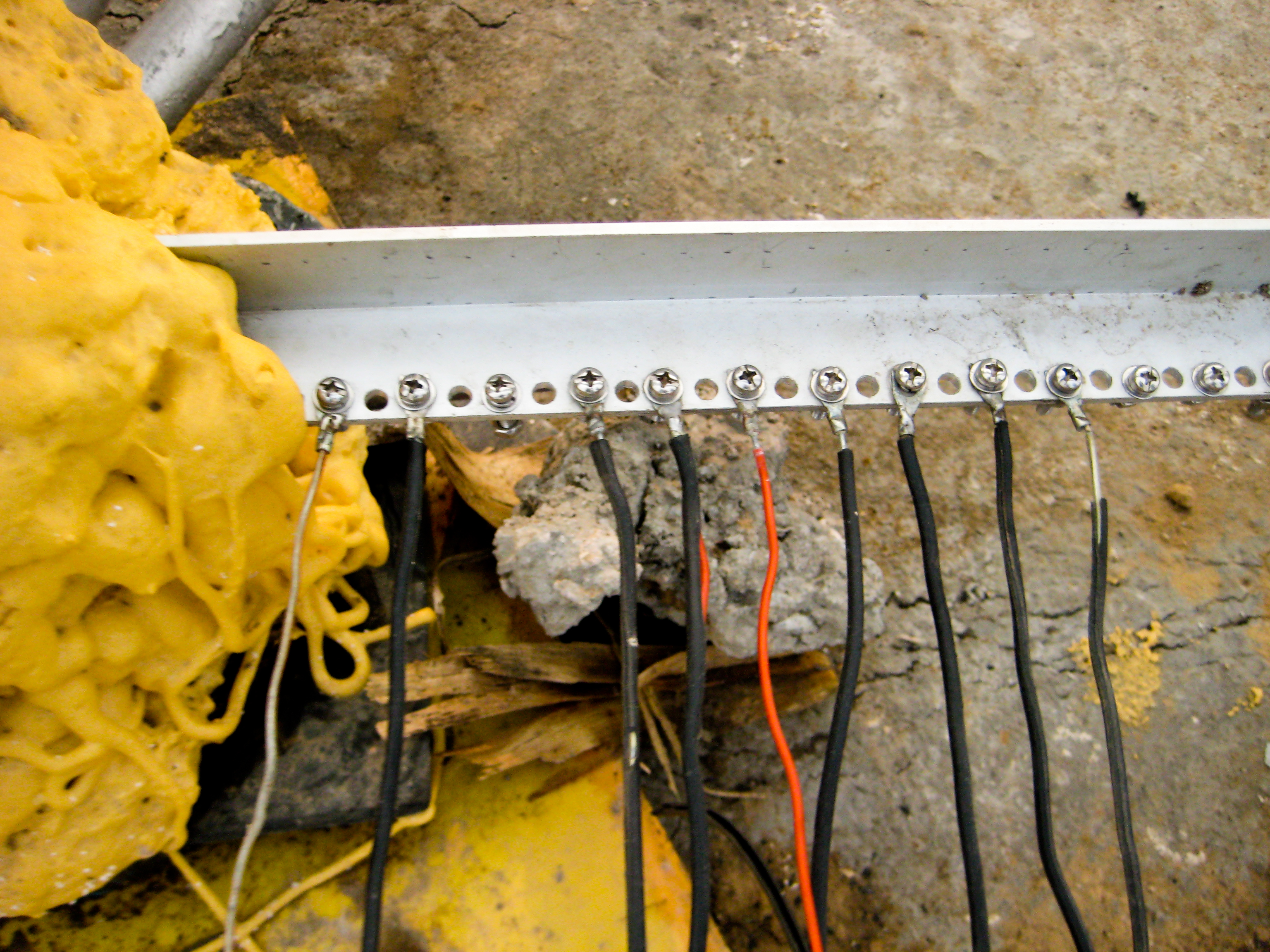 IZ4AKS/BY1RX - Beijing - China - Nov. 09